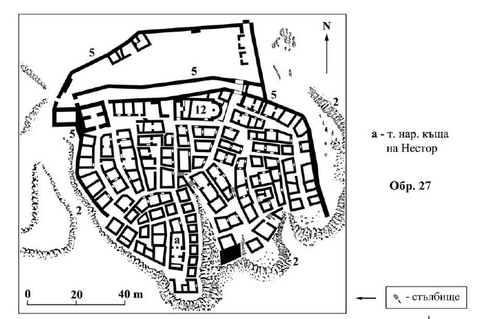 Големаново кале 1938г. по Берсу